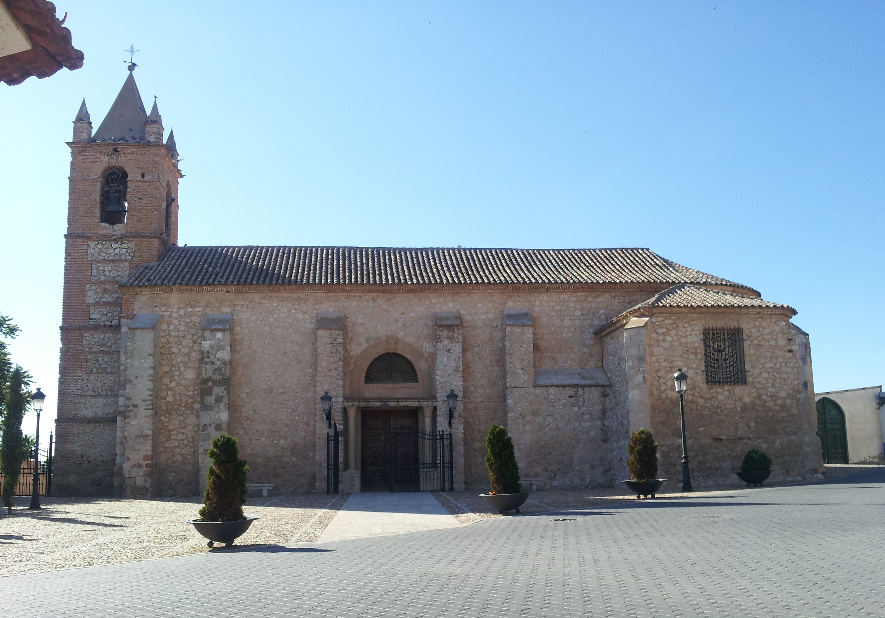 Iglesia de San Juan Bautista del S XVI en Villarta de San Juan